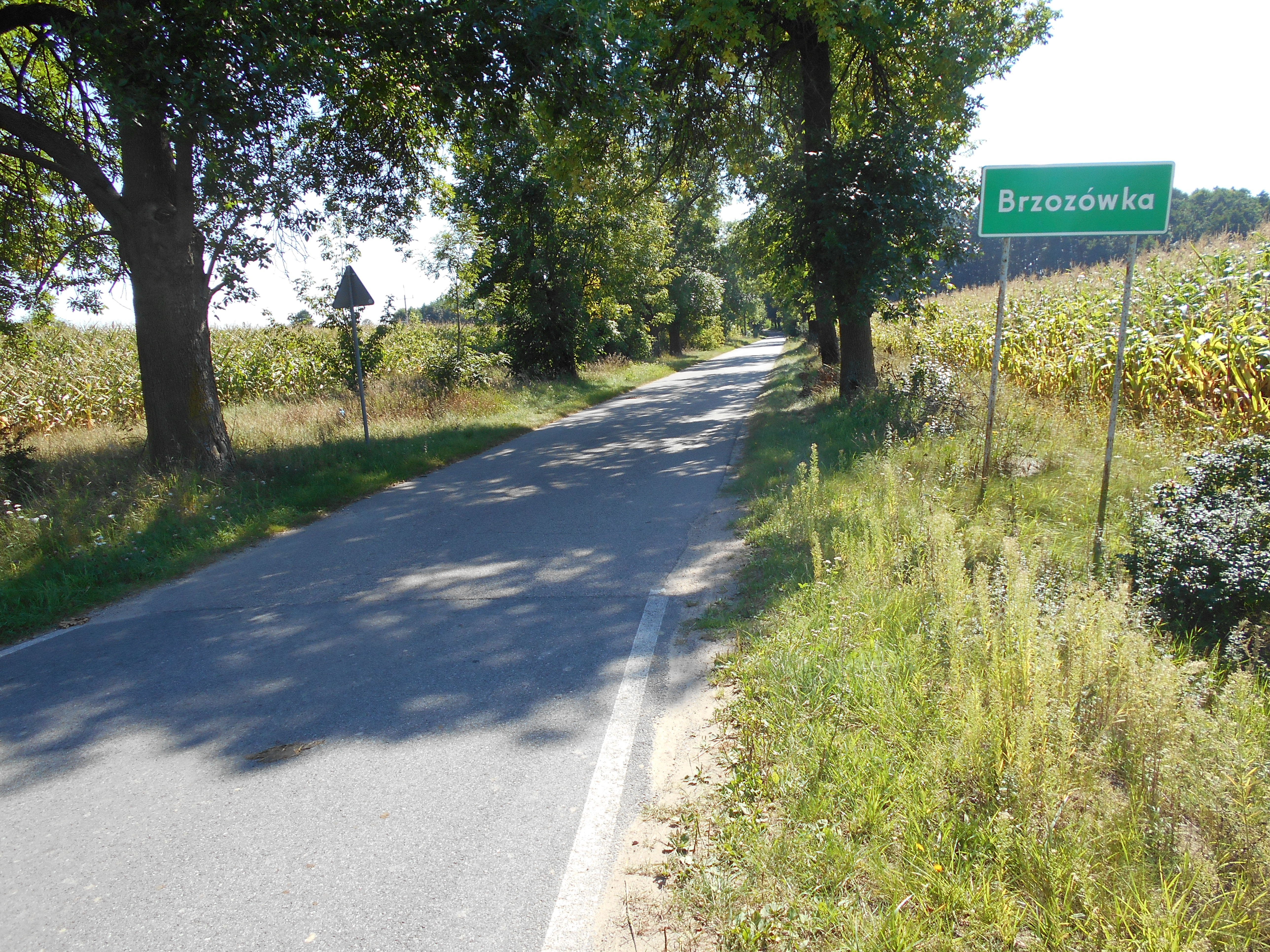 Miejscowość w gminie Jakubów